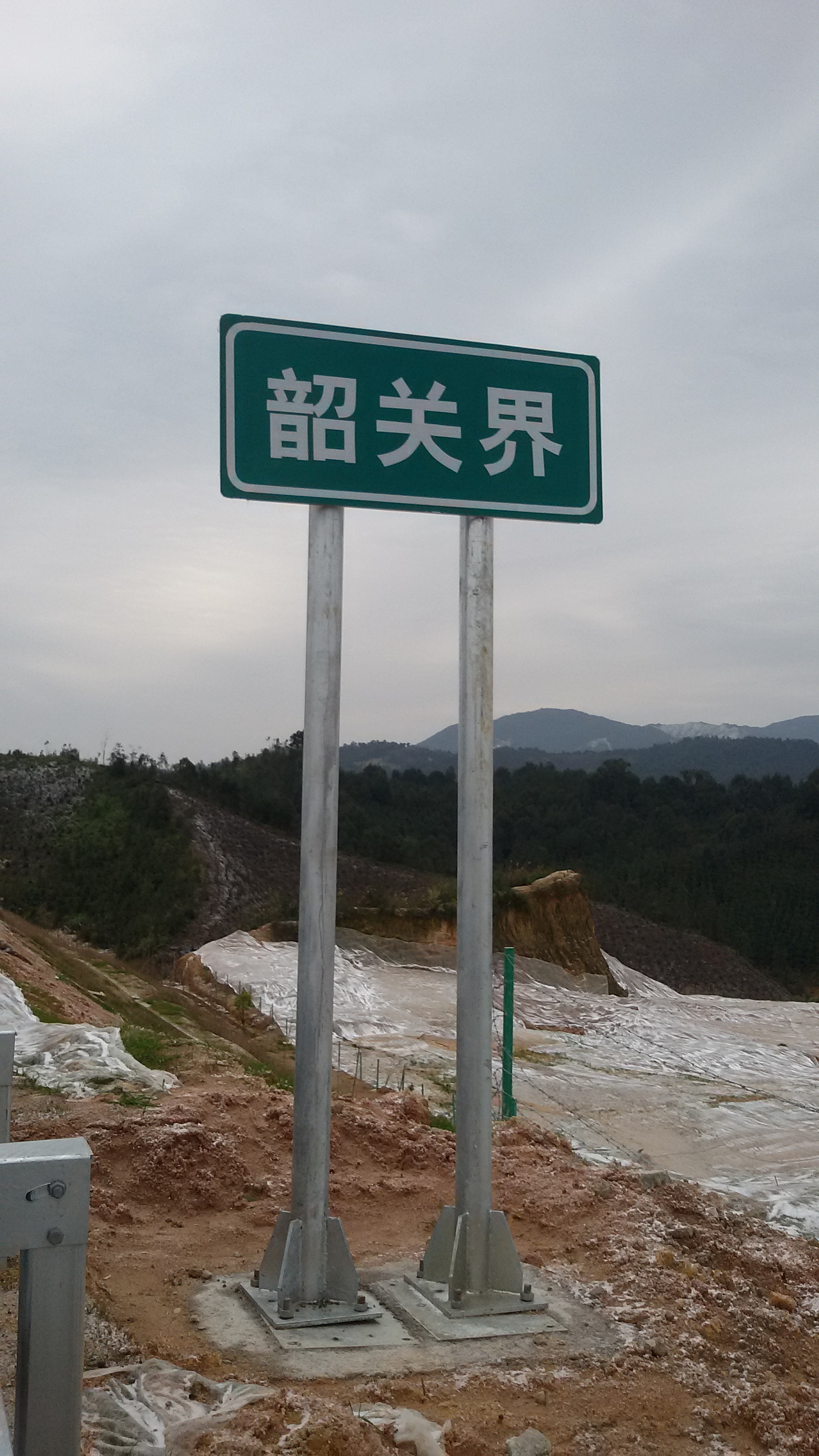 粵語: （大廣高速公路粵鏡段）韶關界